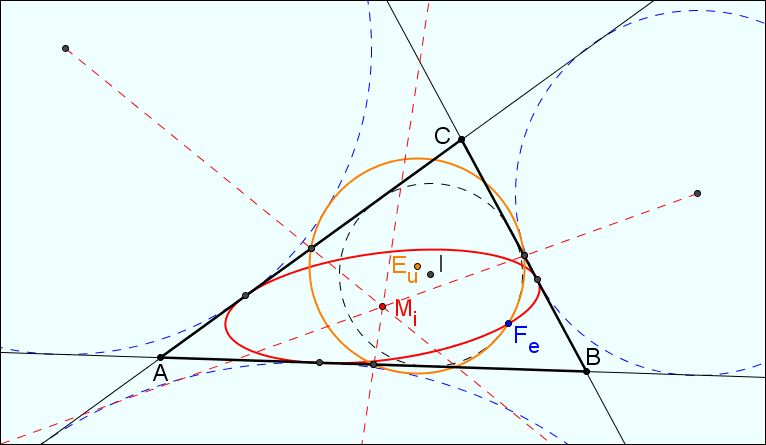 Particularités de l'ellipse de Mandart